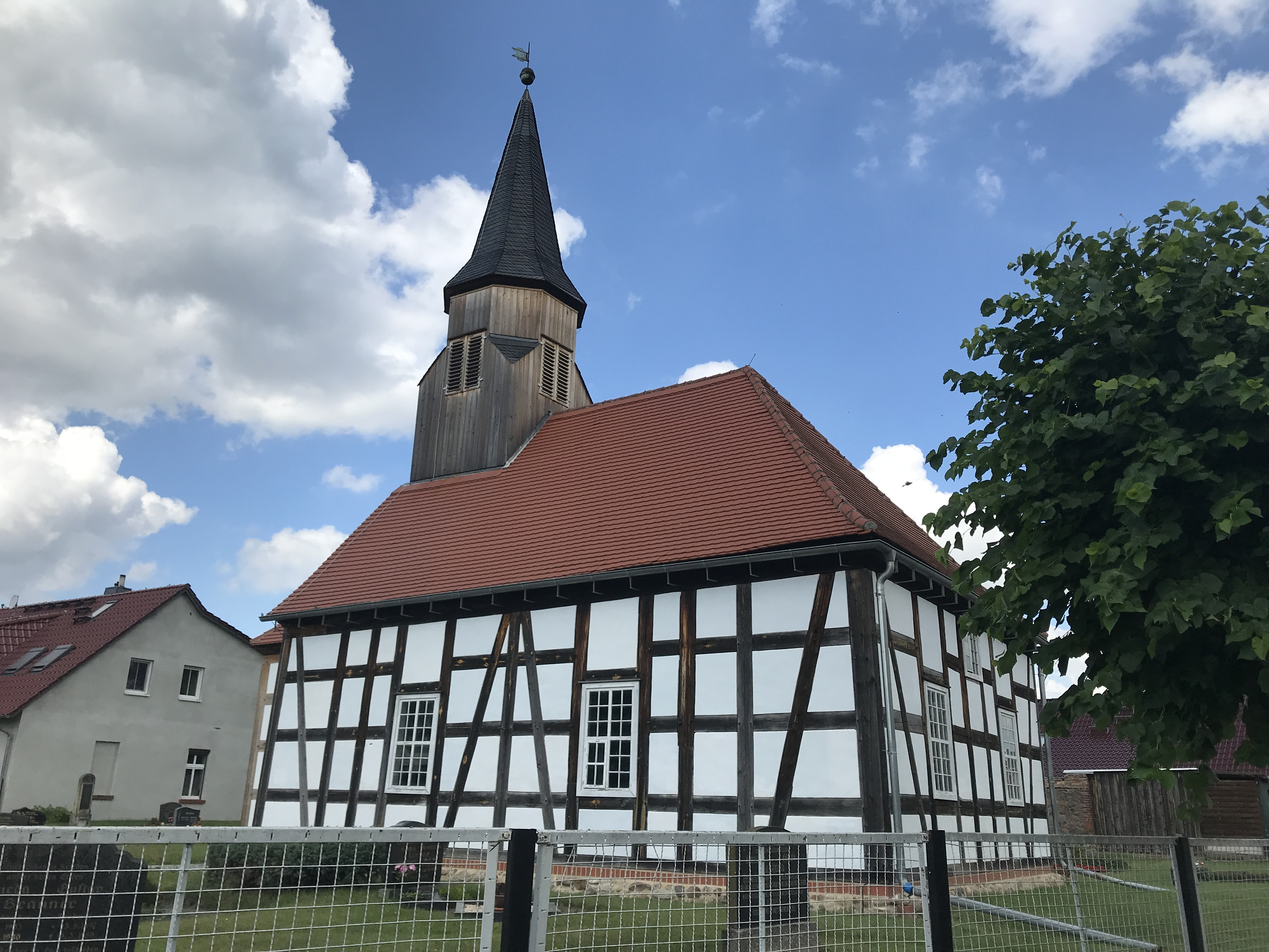 Die Dorfkirche Chossewitz in der Stadt Friedland im Landkreis Oder-Spree ist eine Fachwerkkirche aus der Zeit um 1730. Im Innern steht unter anderem ein Kanzelaltar aus dem Ende des 18. Jahrhunderts.